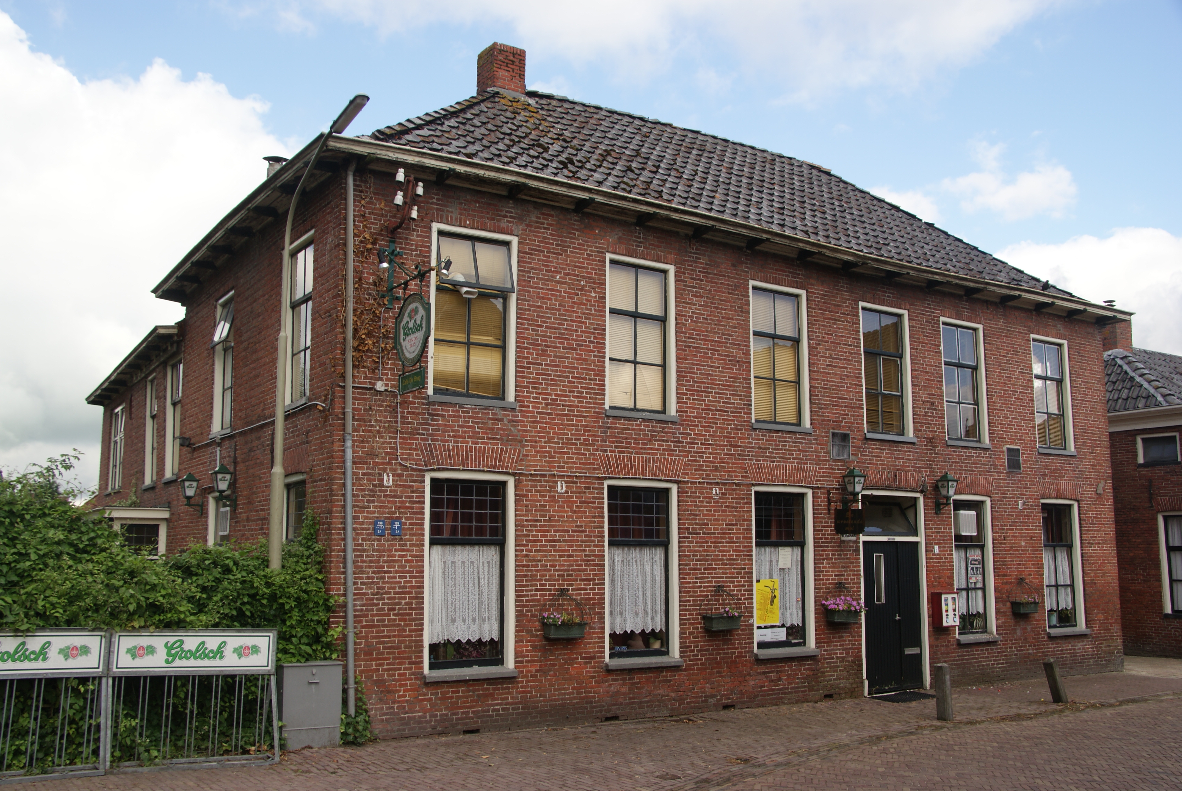 Ezinge Torenstraat 2, rijksmonument 15542